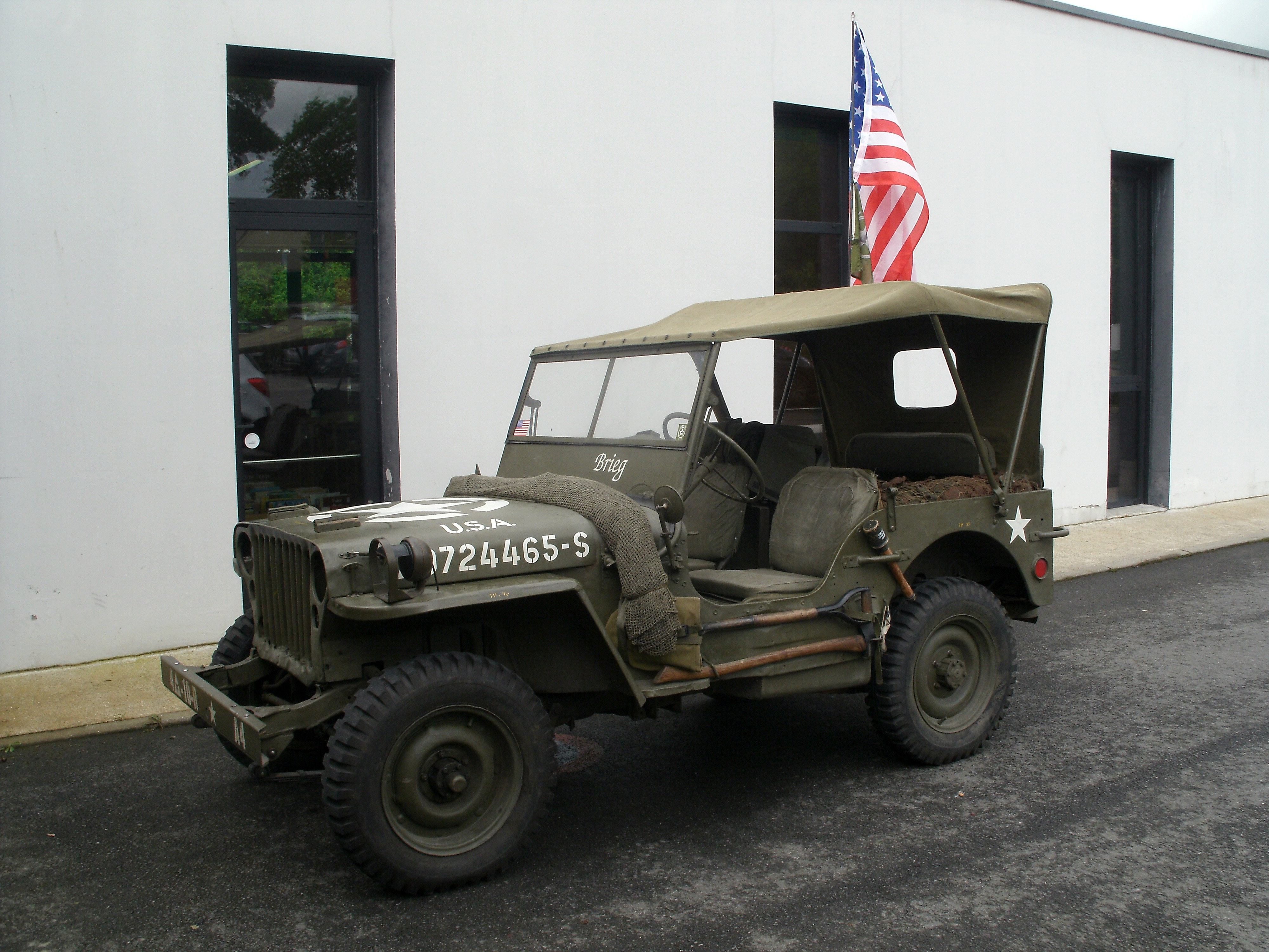 Jeep américaine lors de la commémoration du 8 mai 2015 à Languidic